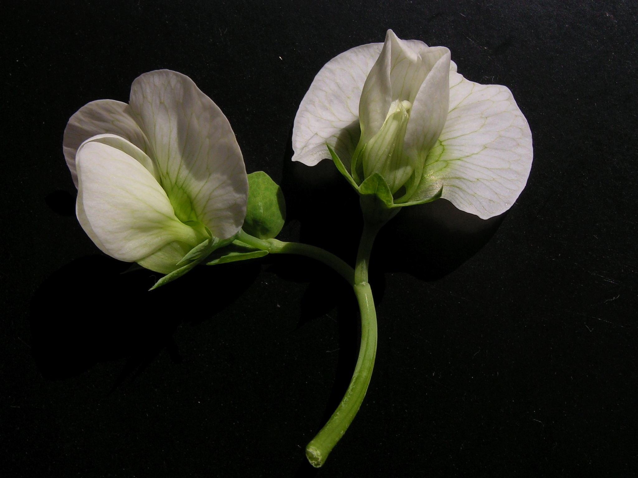 Pisum sativum